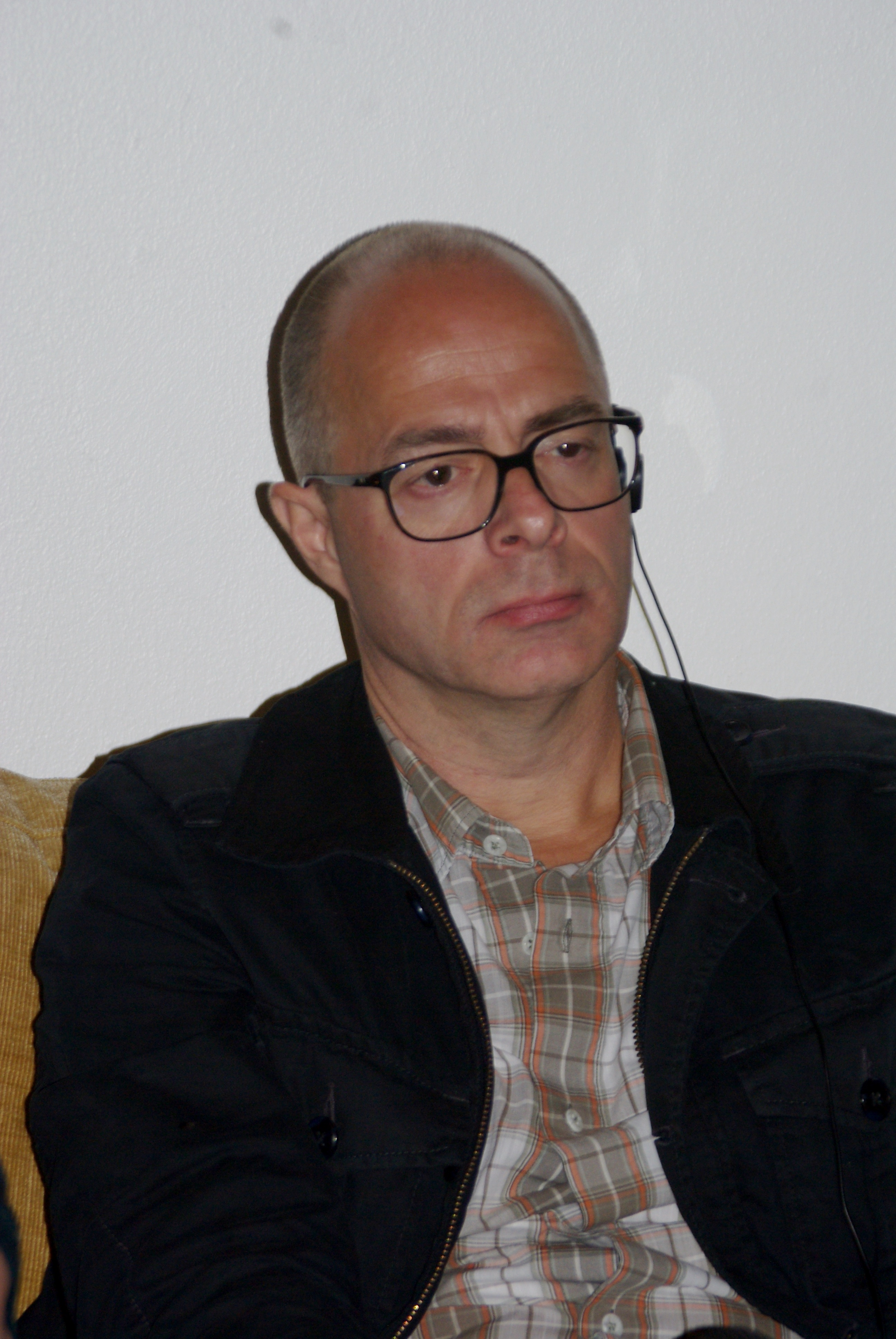 El poeta y narrador danés Niels Frank en la Feria Internacional del Libro de Santiago 2015